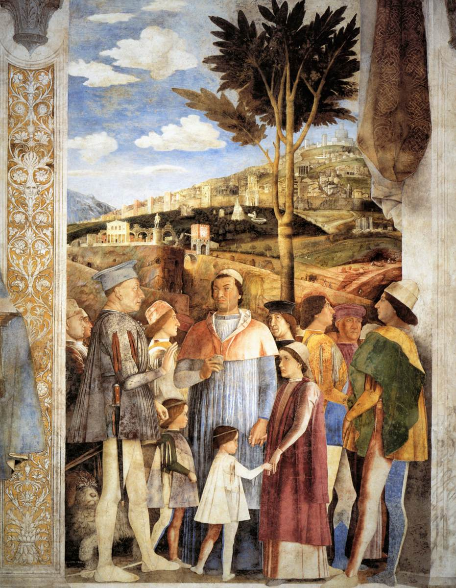 detail